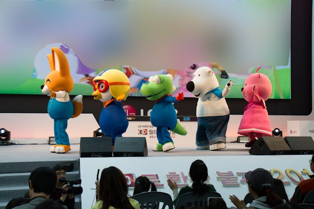 Lg전자가 3월 31일, 4월 1일 양일간 서울 잠실동 롯데월드 아이스링크에서 'lg 시네마3d 월드페스티벌'을 성황리에 개최했다. ※ LG전자 뉴스룸 에서 관련 보도자료를 확인실 수 있습니다.